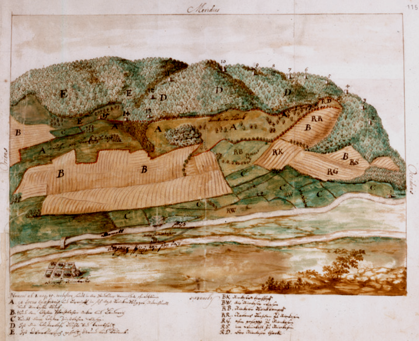 Leuchteberg bei Warburg-Scherfede (1679), Prozessakten des Reichskammergerichts Speyer